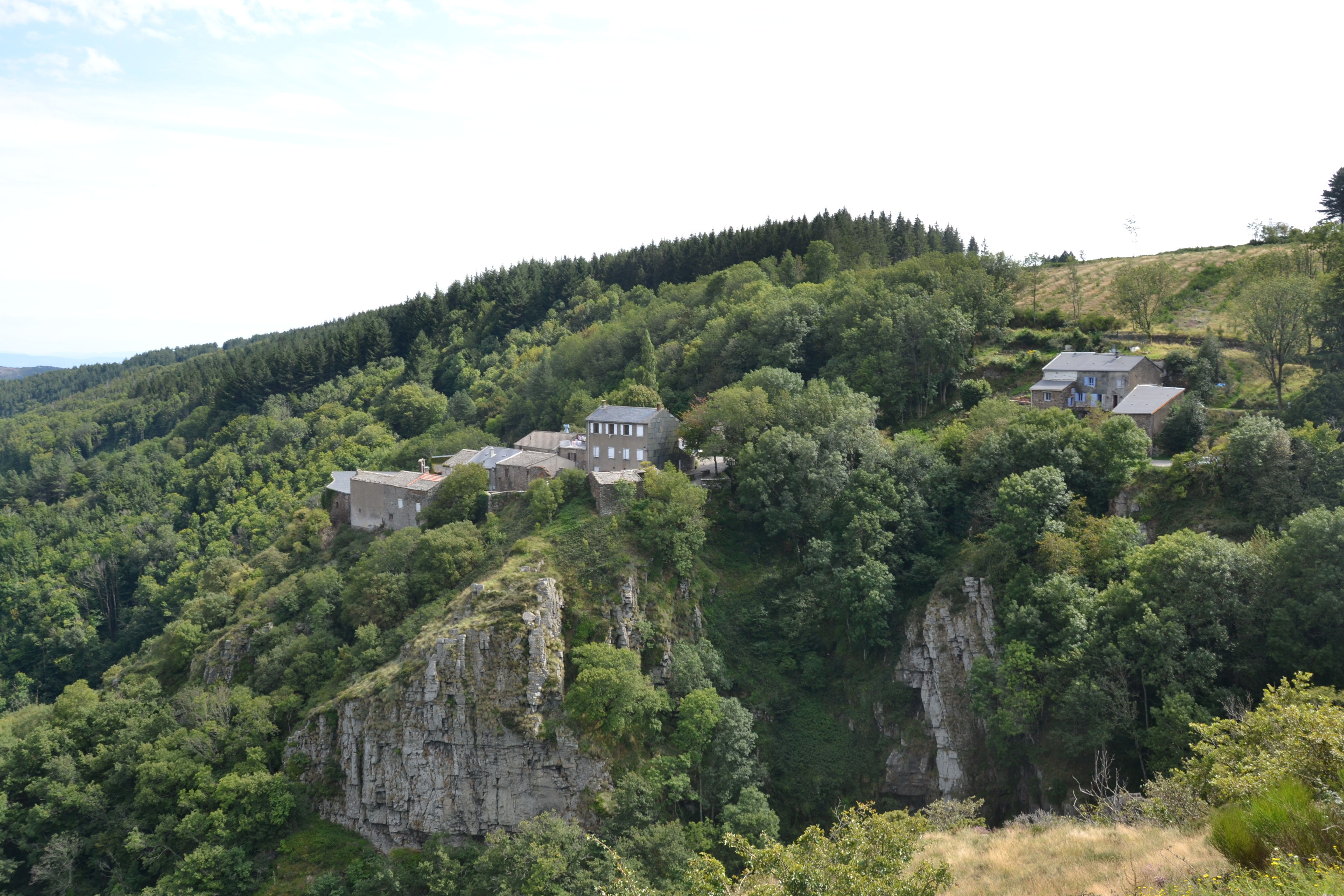 Vue générale du hameau